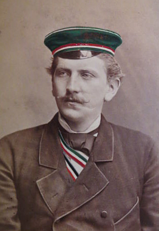 Alexander von Dassel (Corps Misnia Leipzig und Corps Suevia Tübingen, Wintersemster 1879/80). Photograph: W. Höffert, Hannover, Rückseitig mit Widmung von A. v. Dassel Z! Z! (x) Alexander von Dassel (* 1. Dezember 1854 in Lemförde; † 28. Oktober 1942 in Göttingen) war Geheimer Justizrat und Amtsgerichtsrat. Er war ein Sohn des gleichnamigen Alexander von Dassel (* 12. Februar 1817 in Lüneburg; † 18. Juli 1911 Lüchow) und dessen Ehefrau Bertha von Dassel (* 9. Januar 1817 in Hoppensen; † 13. März 1883 in Lüchow). Er studierte in Leipzig und Tübingen und wurde dort Corpsstudent des Corps Misnia Leipzig und des Corps Suevia Tübingen. Er heiratete am 30. März 1894 Helene Busch (* 28. März 1862 in Bleckede; † 13. Januar 1947 in Göttingen).